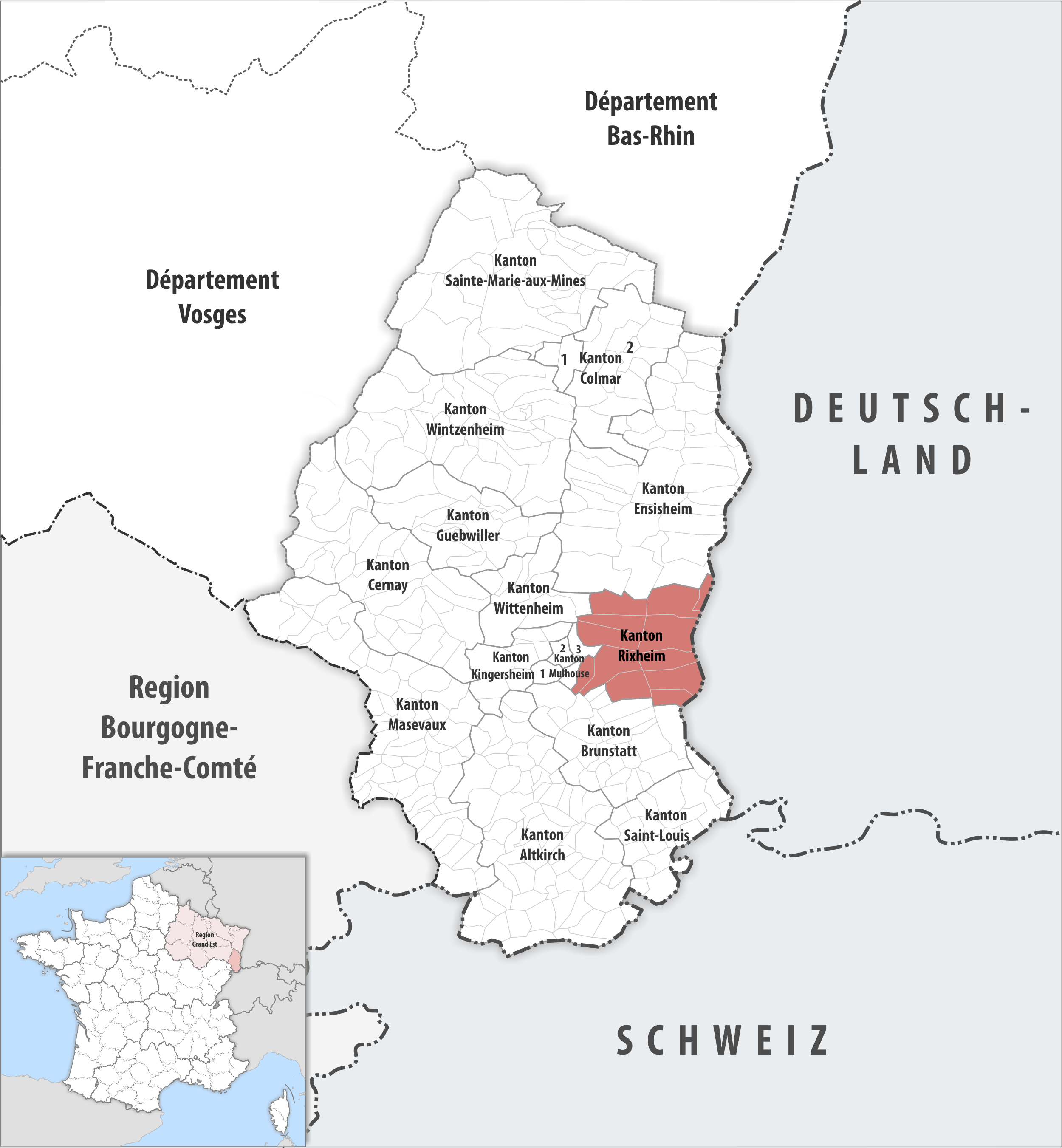 Lage des Kantons Rixheim